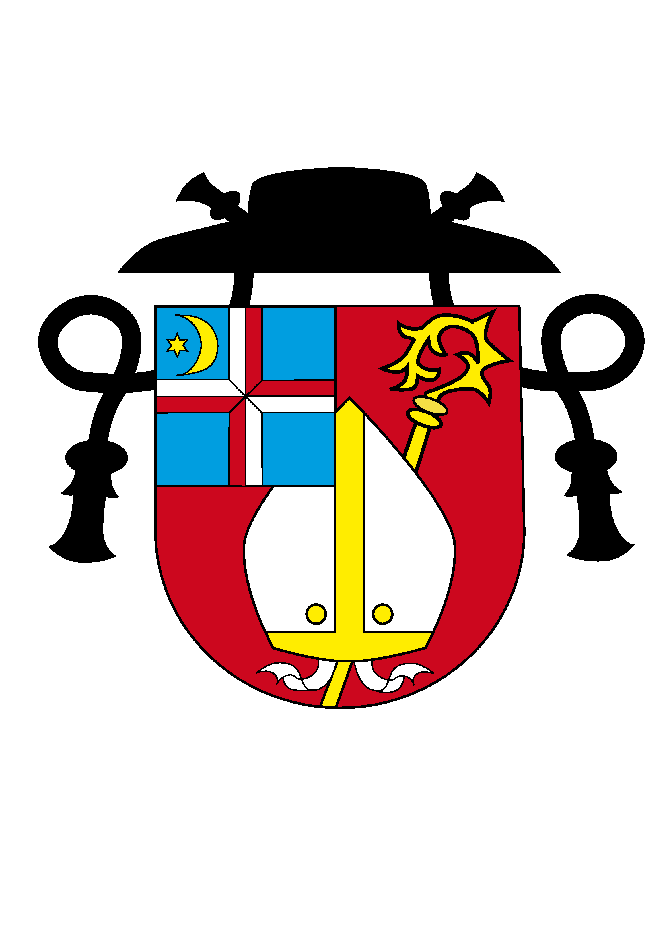 nově zvektorizovaný znak lounské farnosti